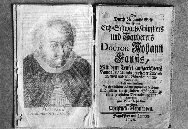 Weimar, Stück der Faust-Sammlung ADN-ZB Ludwig-28.7.89 Bez. Erfurt: "Faust"-Sammlung- Aus dem Jahre 1726 datiert die Bearbeitung des "Faust"-Stoffes von einem "Christlich-Meynenden". Das Buch gehört zu den Schätzen der "Faust"-Sammlung in der Zentralbibliothek der Deutschen Klassik der Nationalen Forschungs- und Gedenkstätten Weimar. (siehe auch 6 und 7 N und ADN-Meldung)